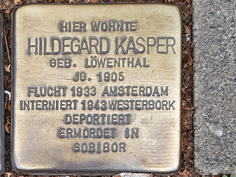 Stolperstein für Hildegard Kasper, geb. Löwenthal, Sternbuschweg 14, Duisburg-Neudorf, Jg. 1905, Flucht 1933 nach Amsterdam, interniert 1943 in Westerbork, deportiert, ermordet 1943 im Vernichtungslager Sobibor